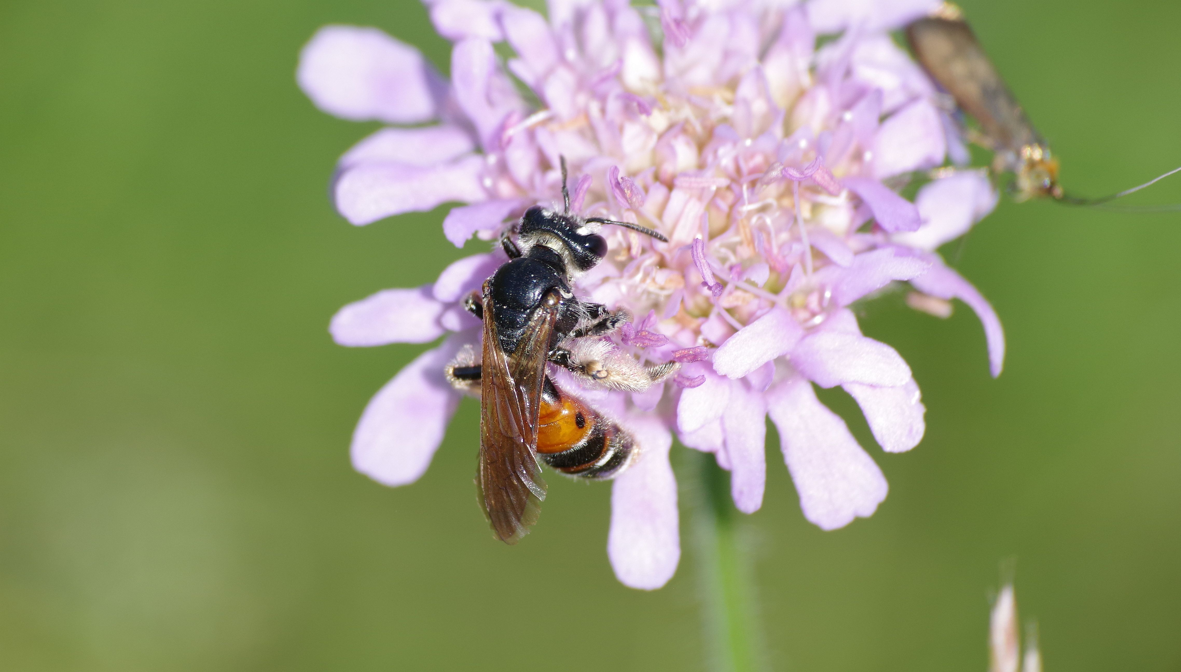 Pískorypka chrastavcová živící se nektarem ze své živné rostliny. Ohrožený druh samotářské včely. Vyfocený v Turnově, v Českém ráji.